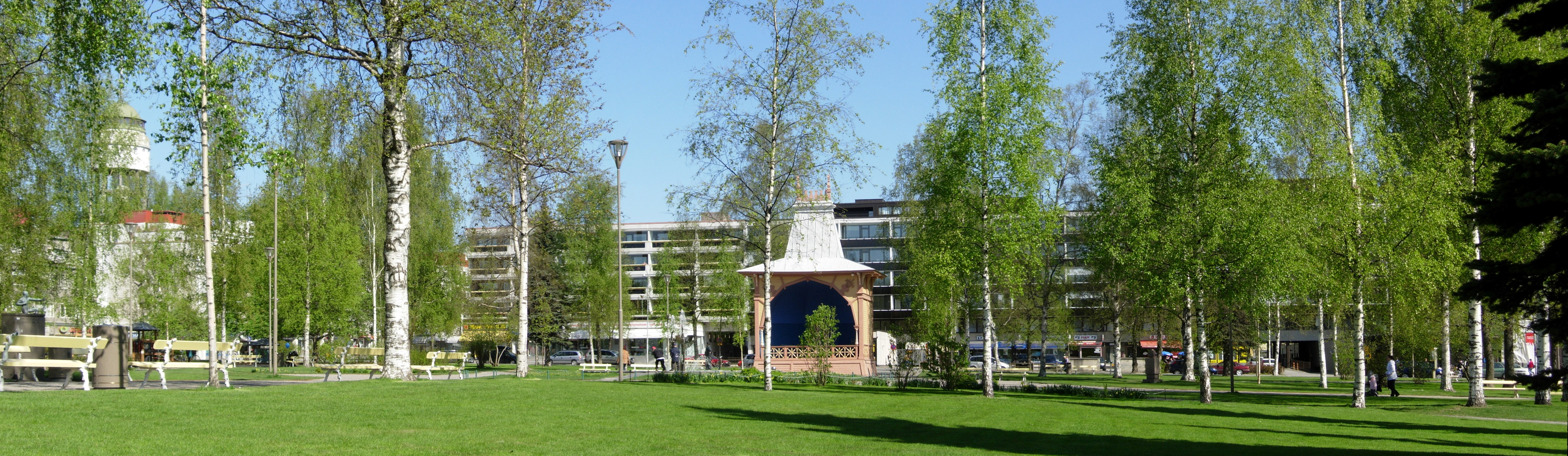 Kirkkopuisto, Mikkeli